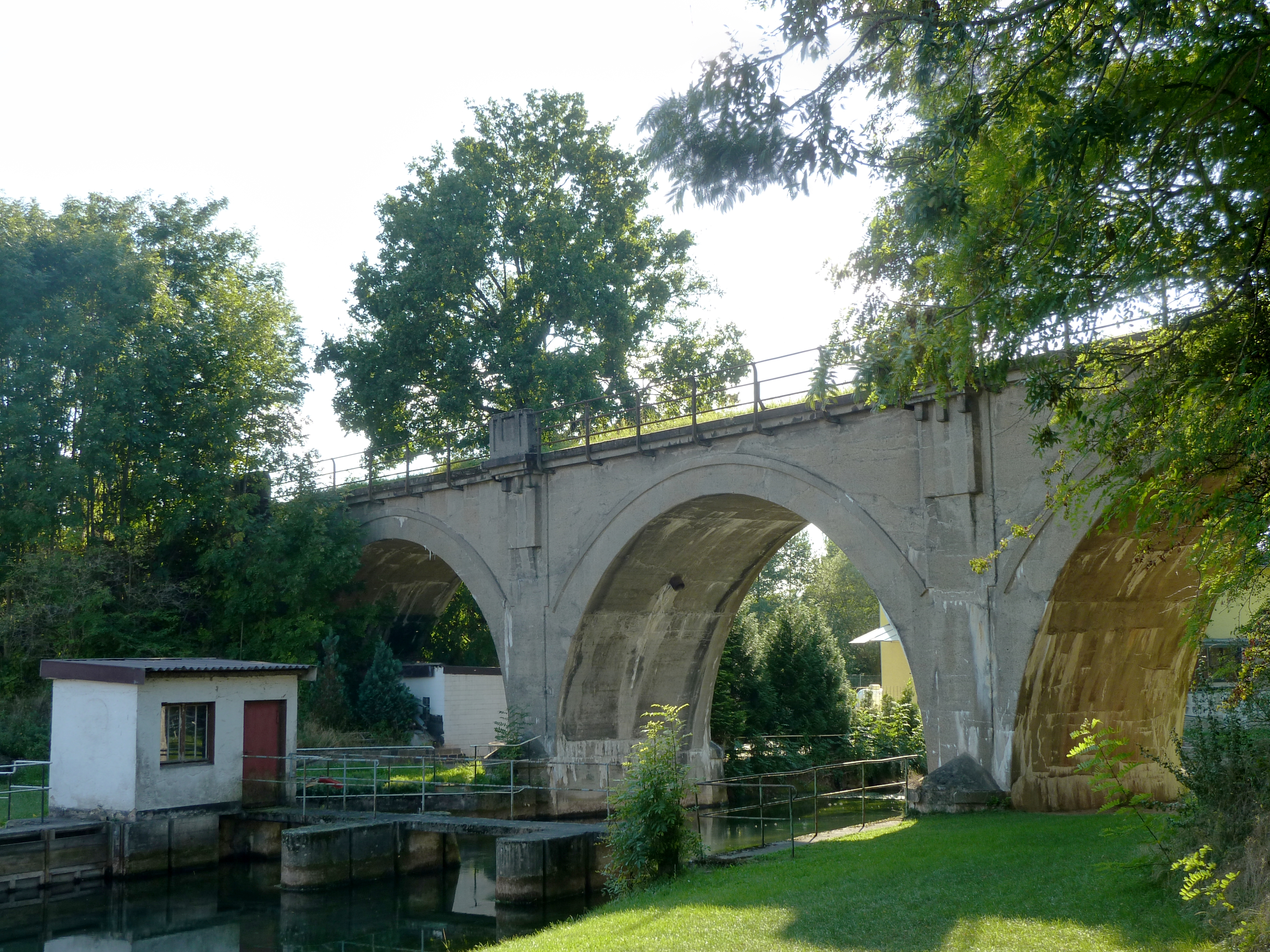 Brücke der ehemaligen Eisenbahnstrecke Bleicherode - Herzberg über die Rhume in Rhumspringe, Niedersachsen